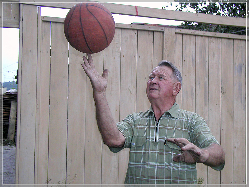 Величко Л.К.